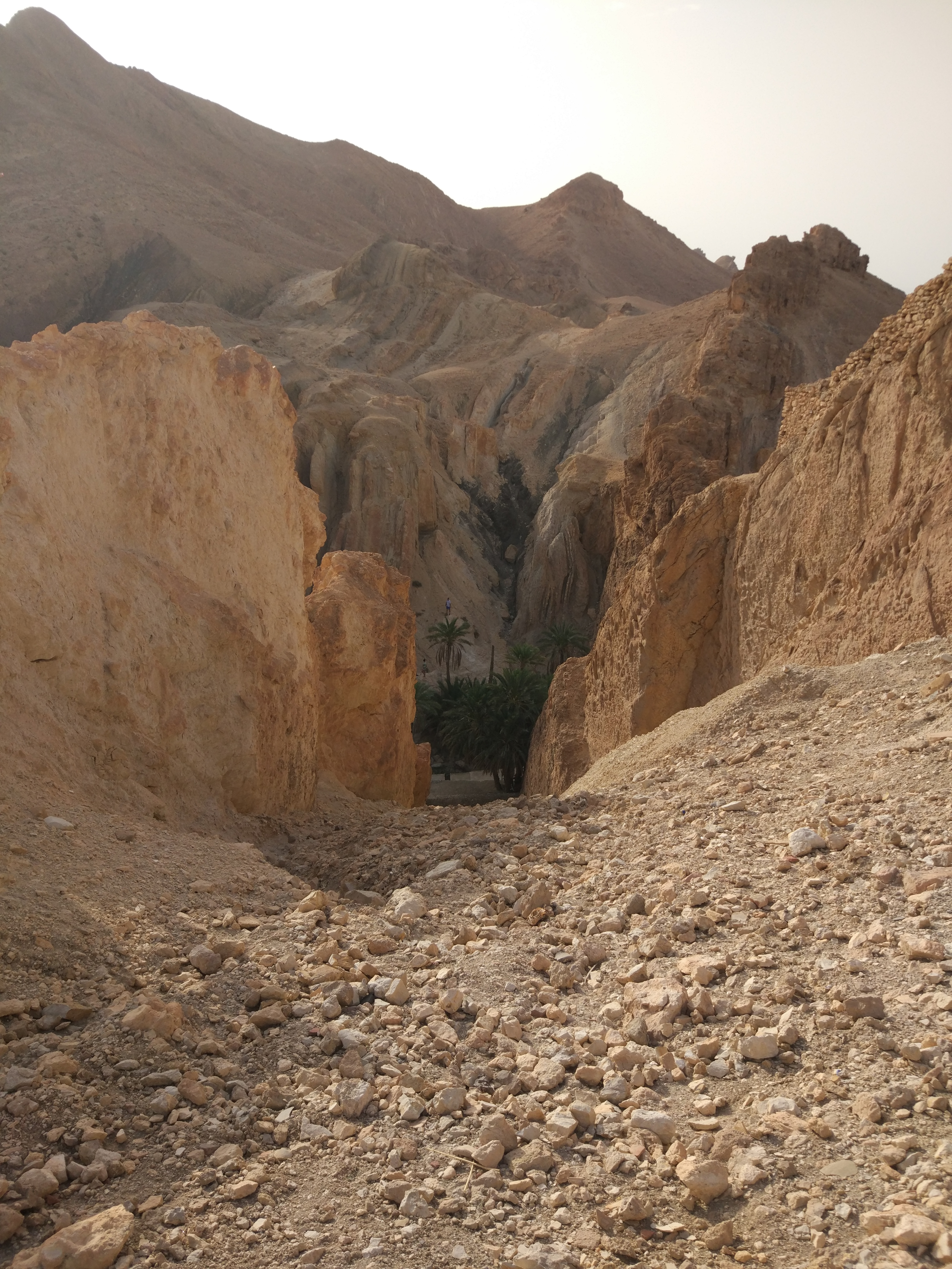 Вид на Атласские горы вблизи горного оазиса Чебика, Таузар, Тунис.